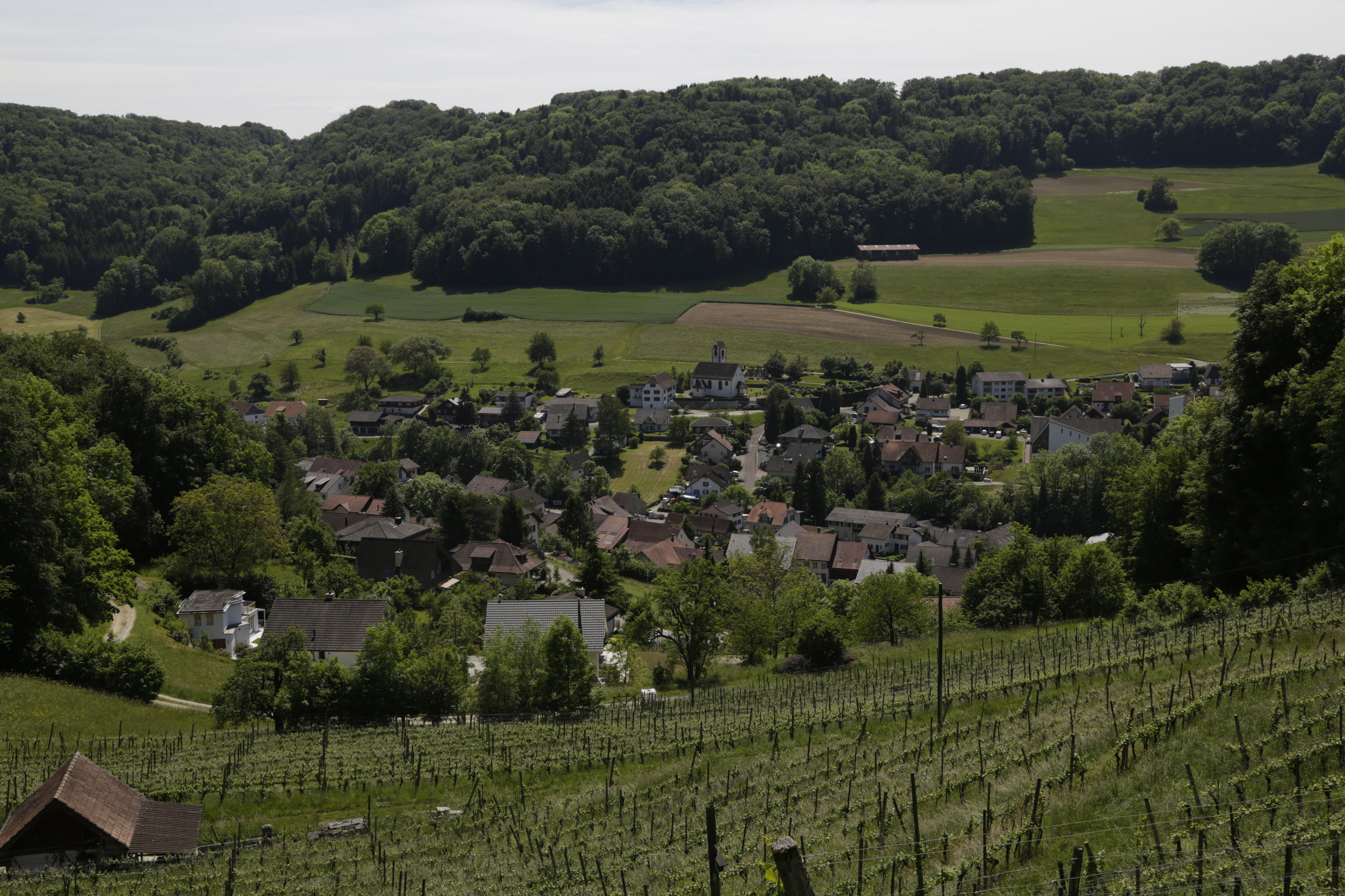 Blick vom Weinberg unterhalb der Trumleste auf Obermumpf.